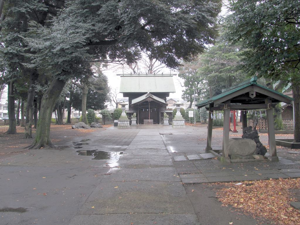 上染谷八幡神社。東京都府中市。